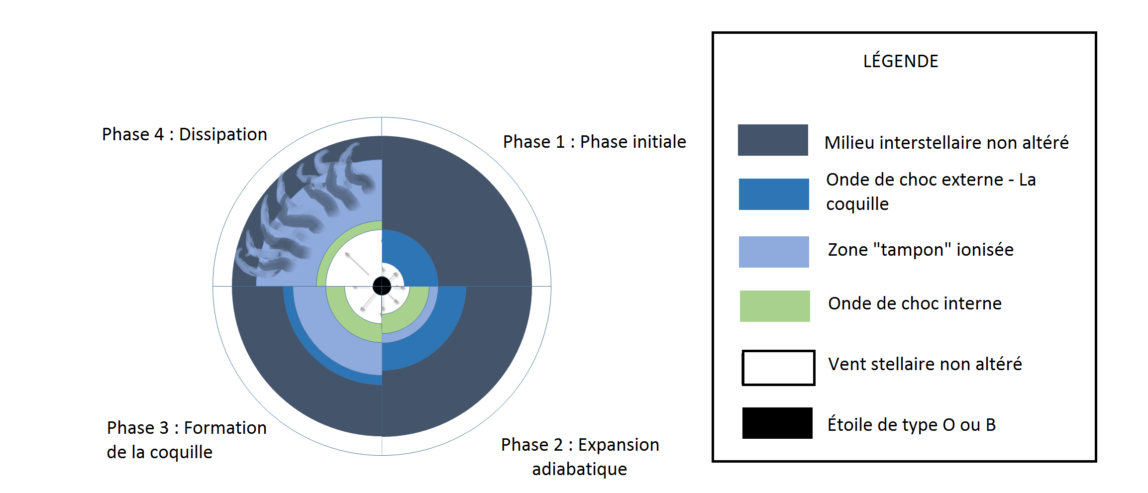 Schéma de l'évolution d'une bulle de vent stellaire, inspirée de Rozyczka, M. et Tenorio-Tagle, G.(1985